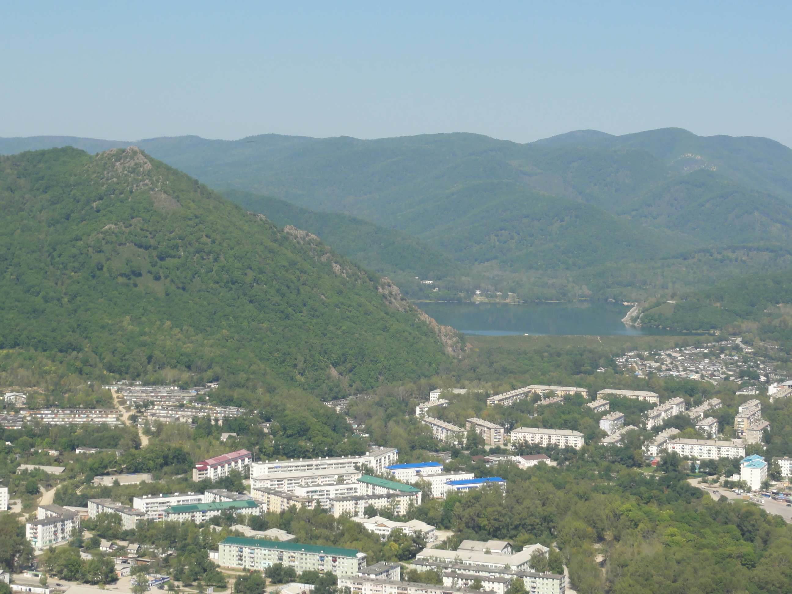 Микрорайон Дальнегорска - Горбуша (Горького)